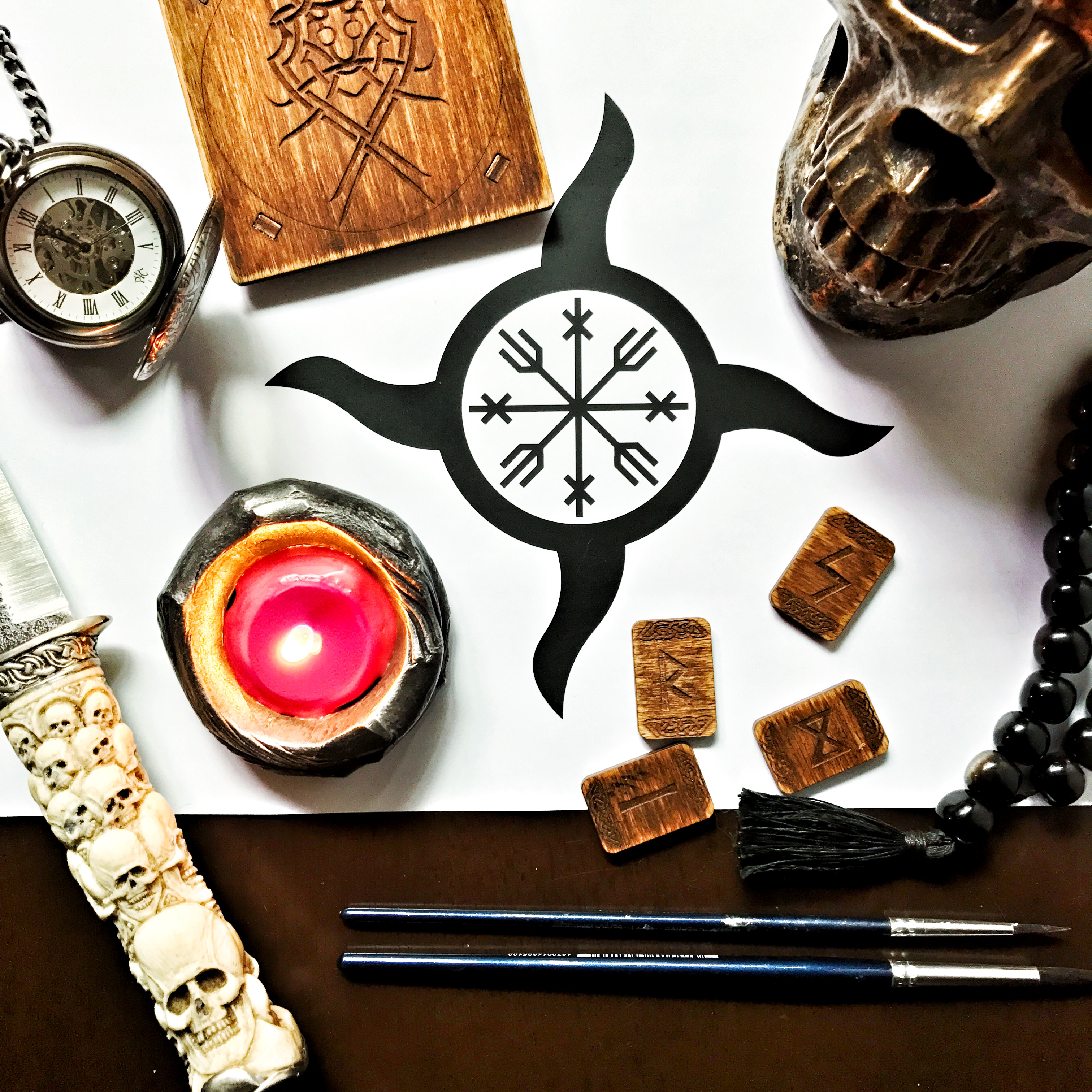 Символ рёккатру, использующийся в России.